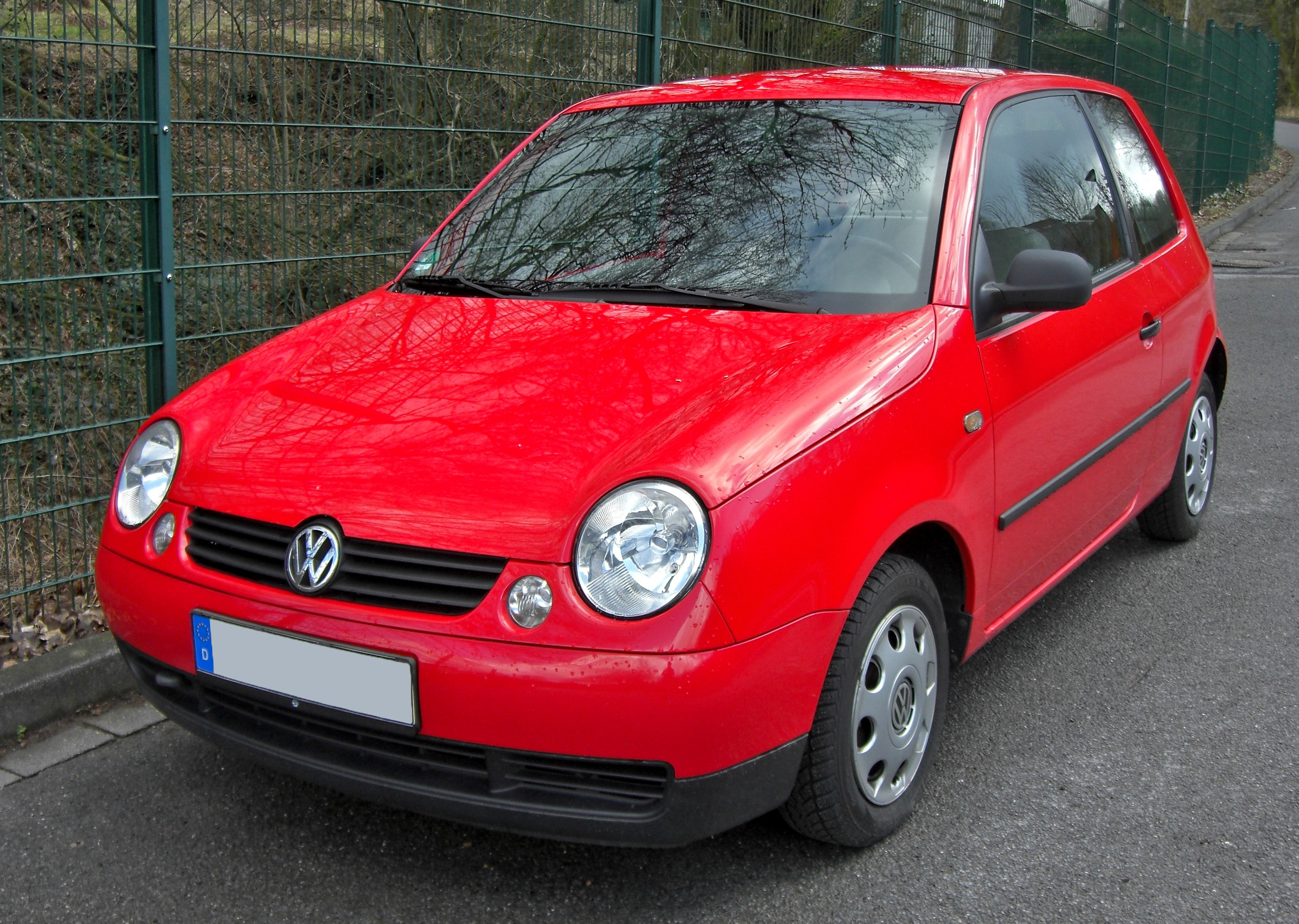 VW Lupo